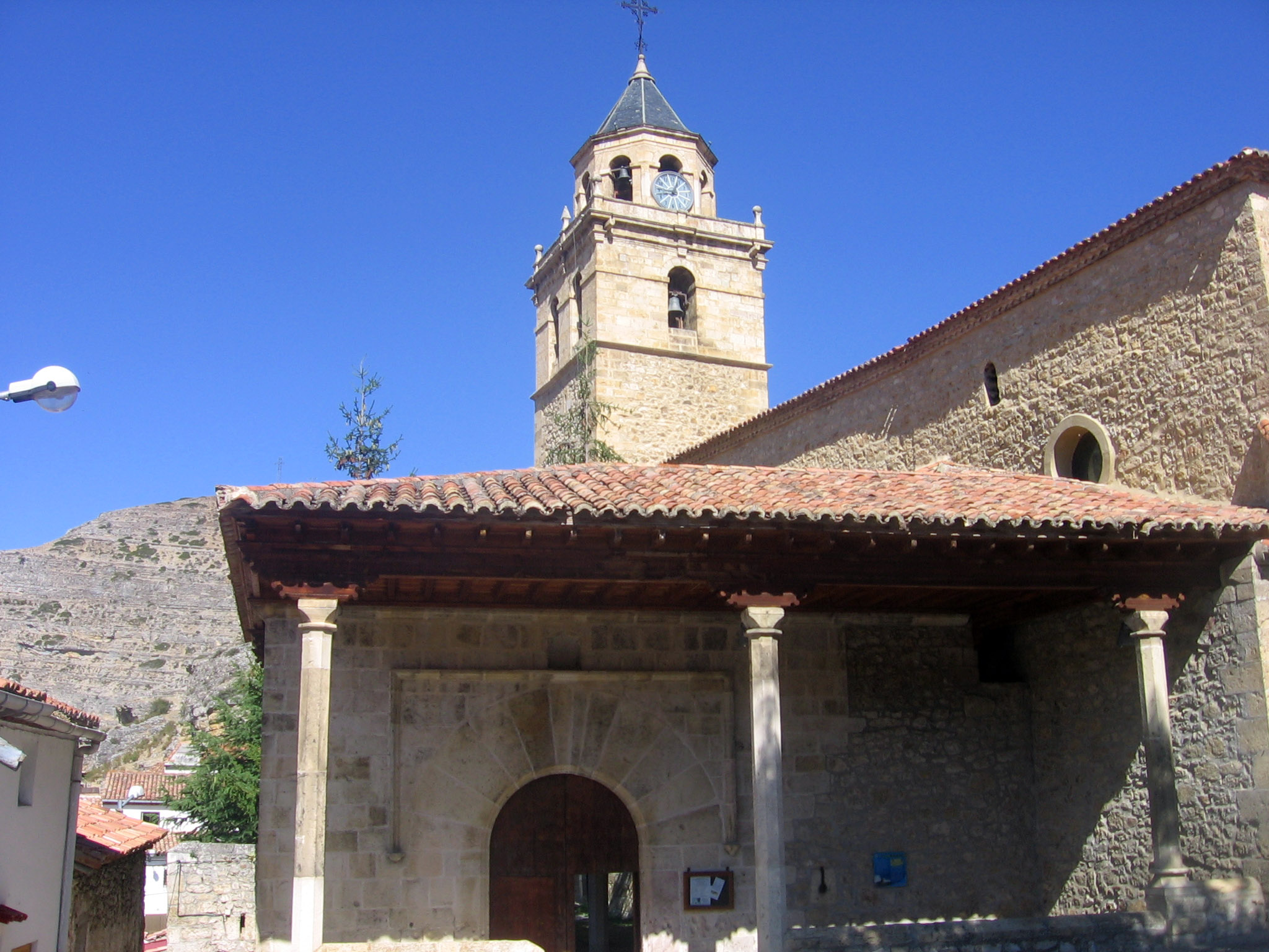 Iglesia de los Santos Justo y Pastor, Villar del Cobo.